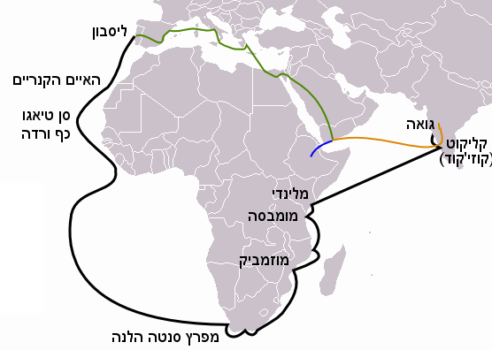 Caminho maritimo para a India